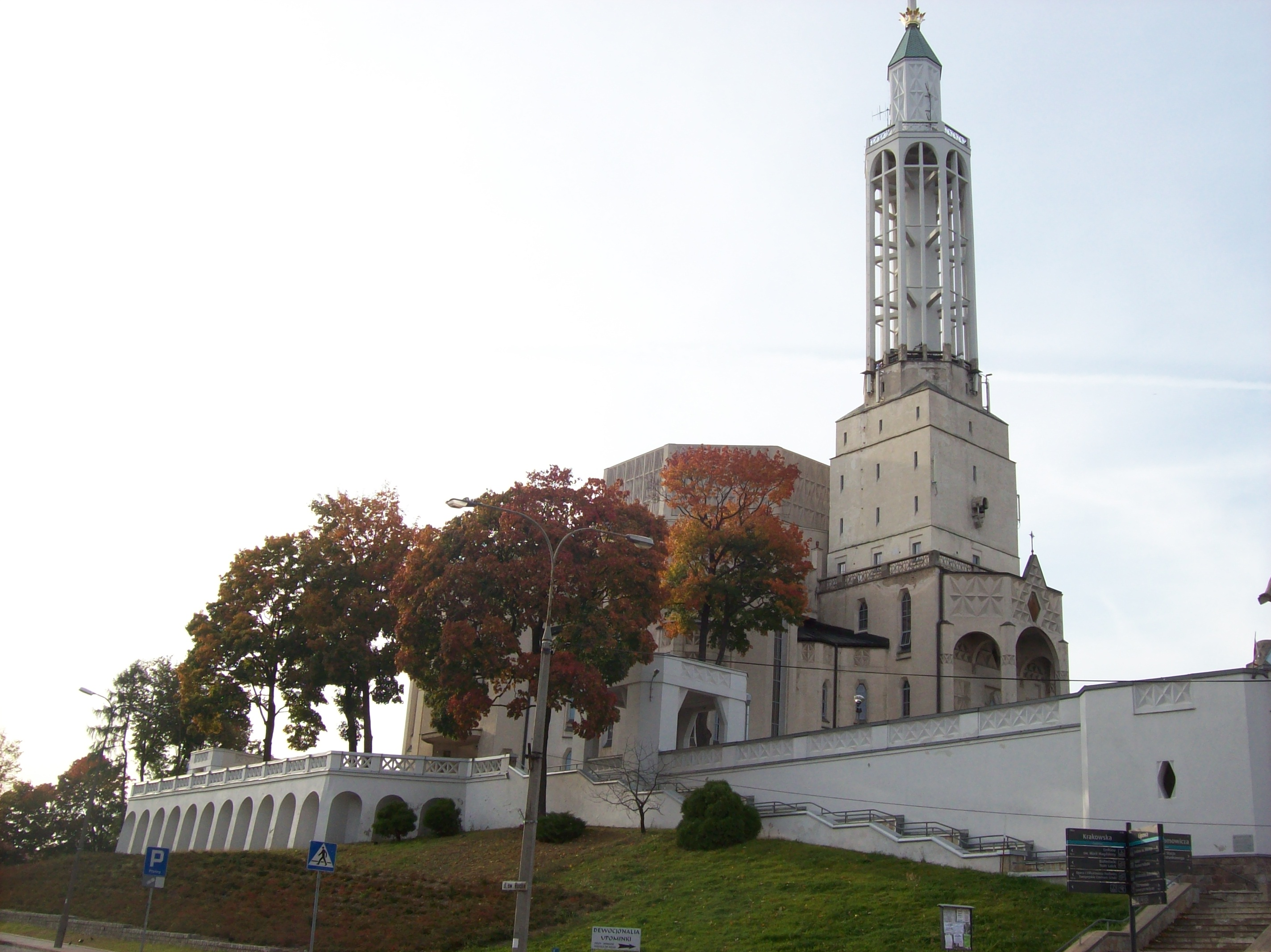 Białystok, ul. Dąbrowskiego - zespół kościoła parafialnego p.w. św. Rocha i Chrystusa Króla (zabytek nr A-193 z 12.12.1975)